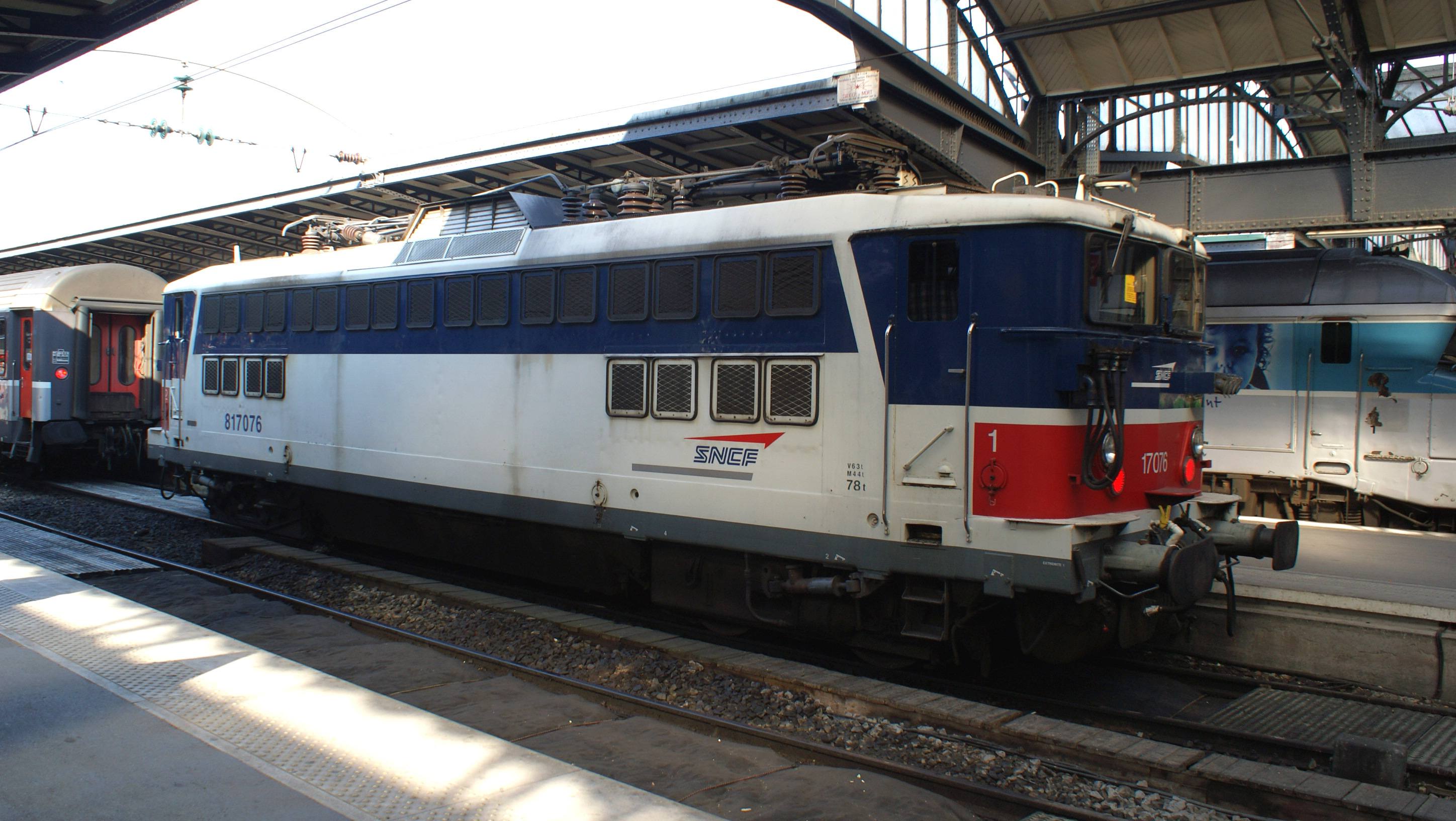 BB 17076 en attente à Paris-Est